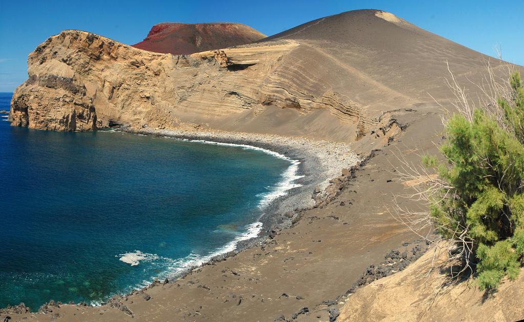 Capelinhos Vulcano, Faial Island, Azores